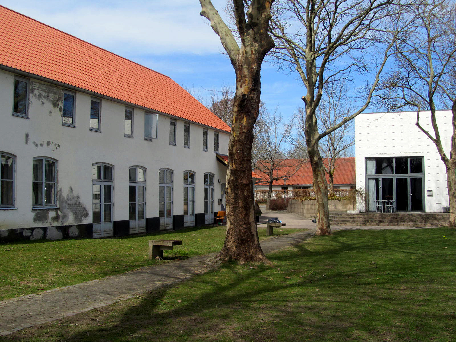 Brandbjerg Højskole